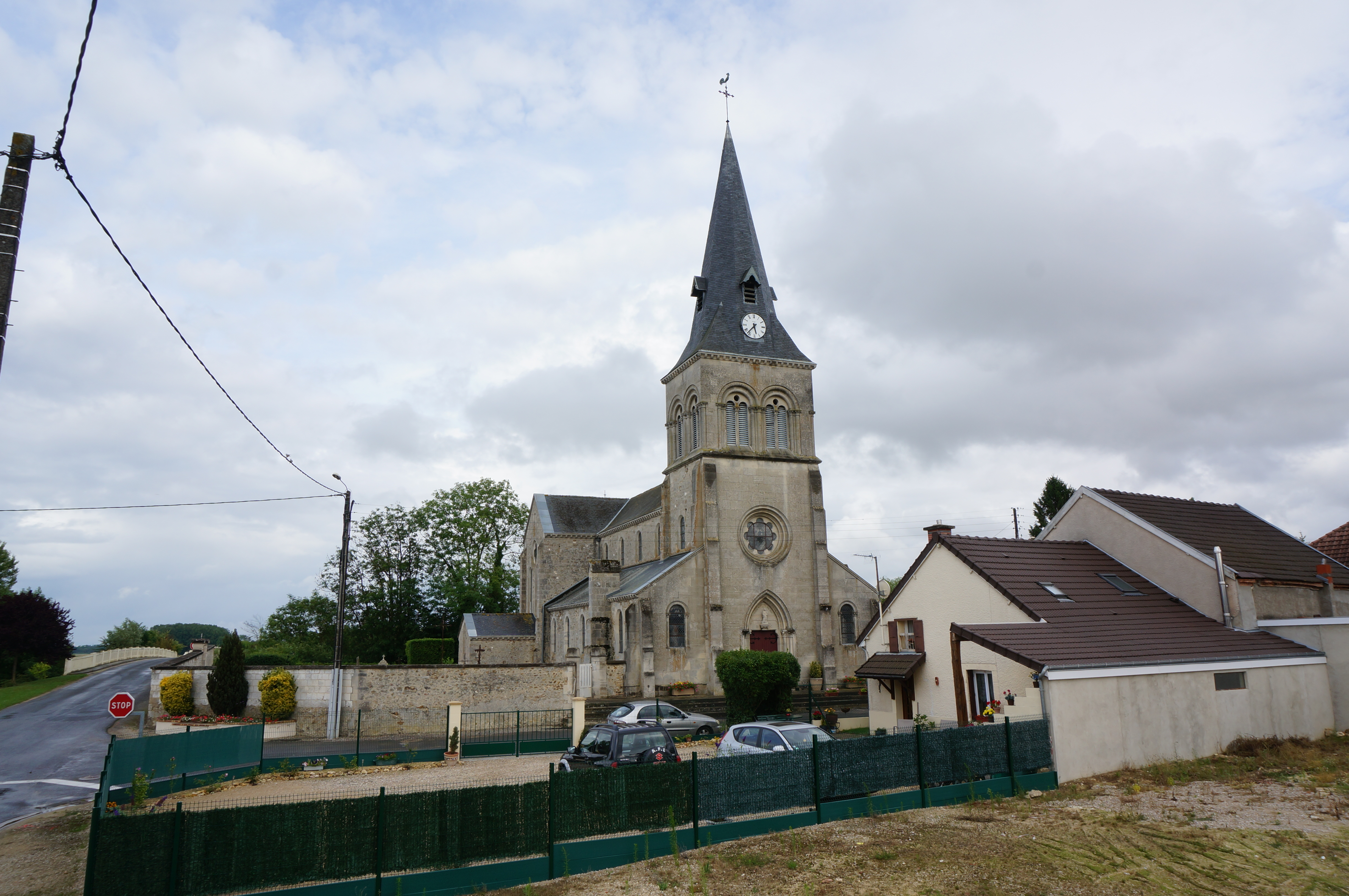 vue de l'église D'aulnay.